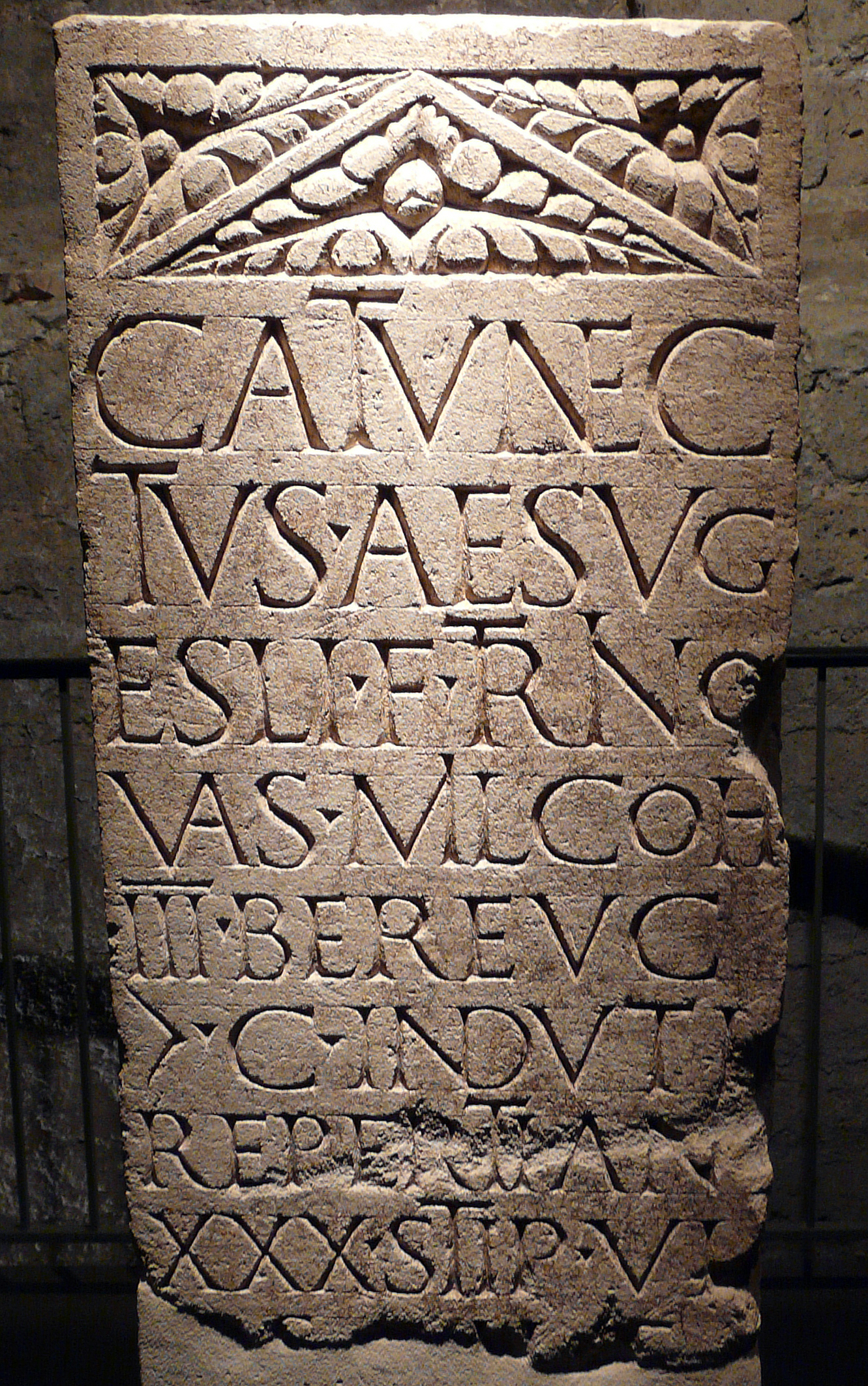 AE 2003, 01218 im Praetorium der CCAA